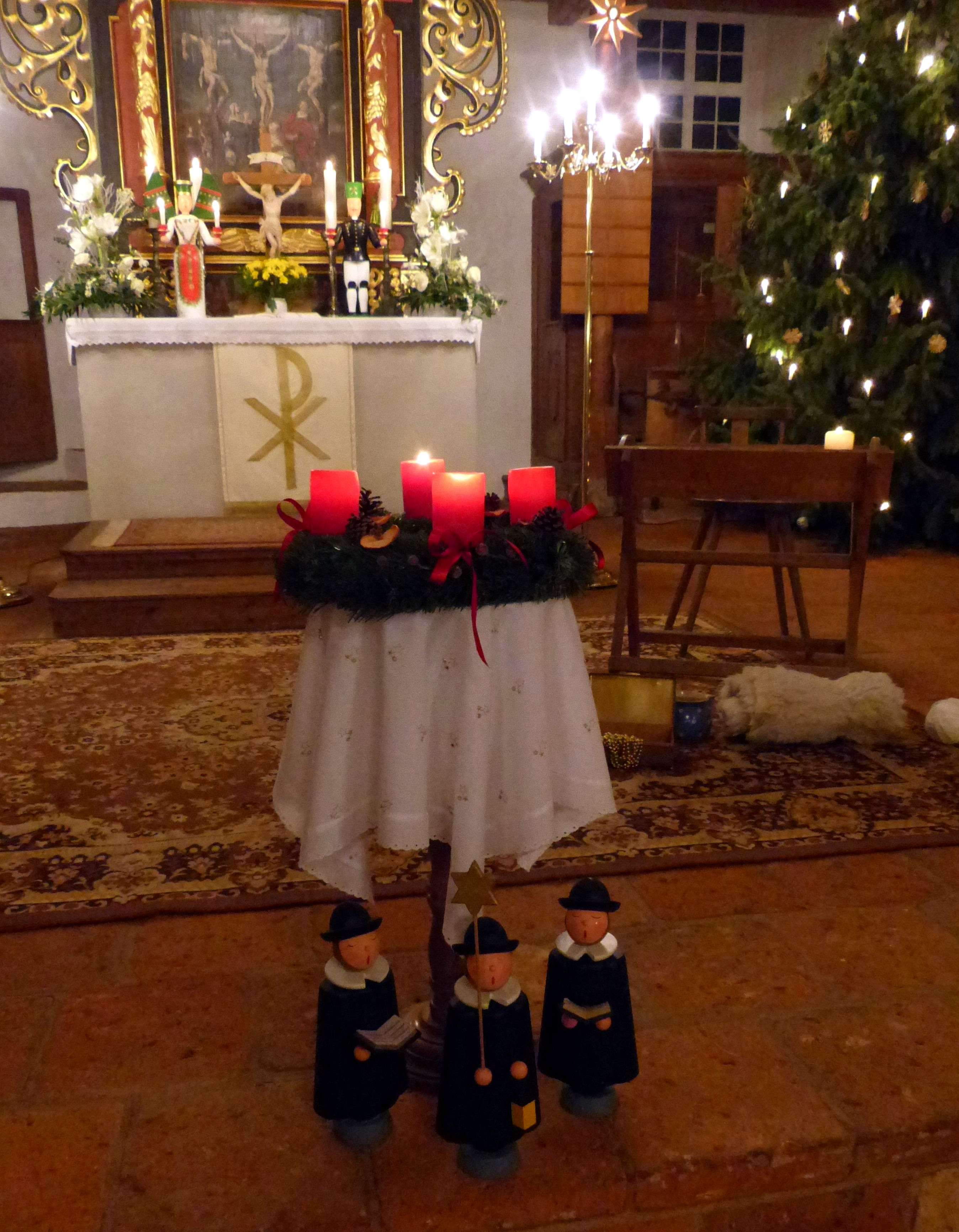 Weihnachtsdekoration in der Exulanten-Kirche Oberneuschönberg: Kurrende, Adventskranz, Bergmann und Engel auf dem Altar, Weihnachtsbaum und Krippe mit Kerze